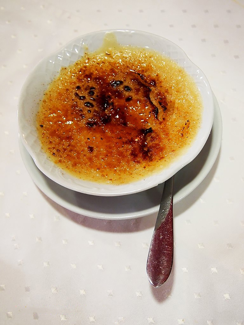 Postre de arroz con leche